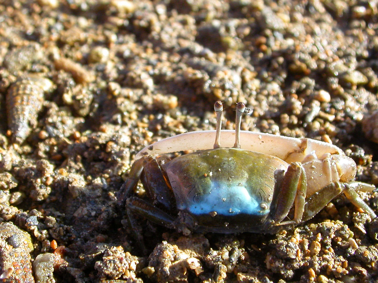 Uca dussumieri